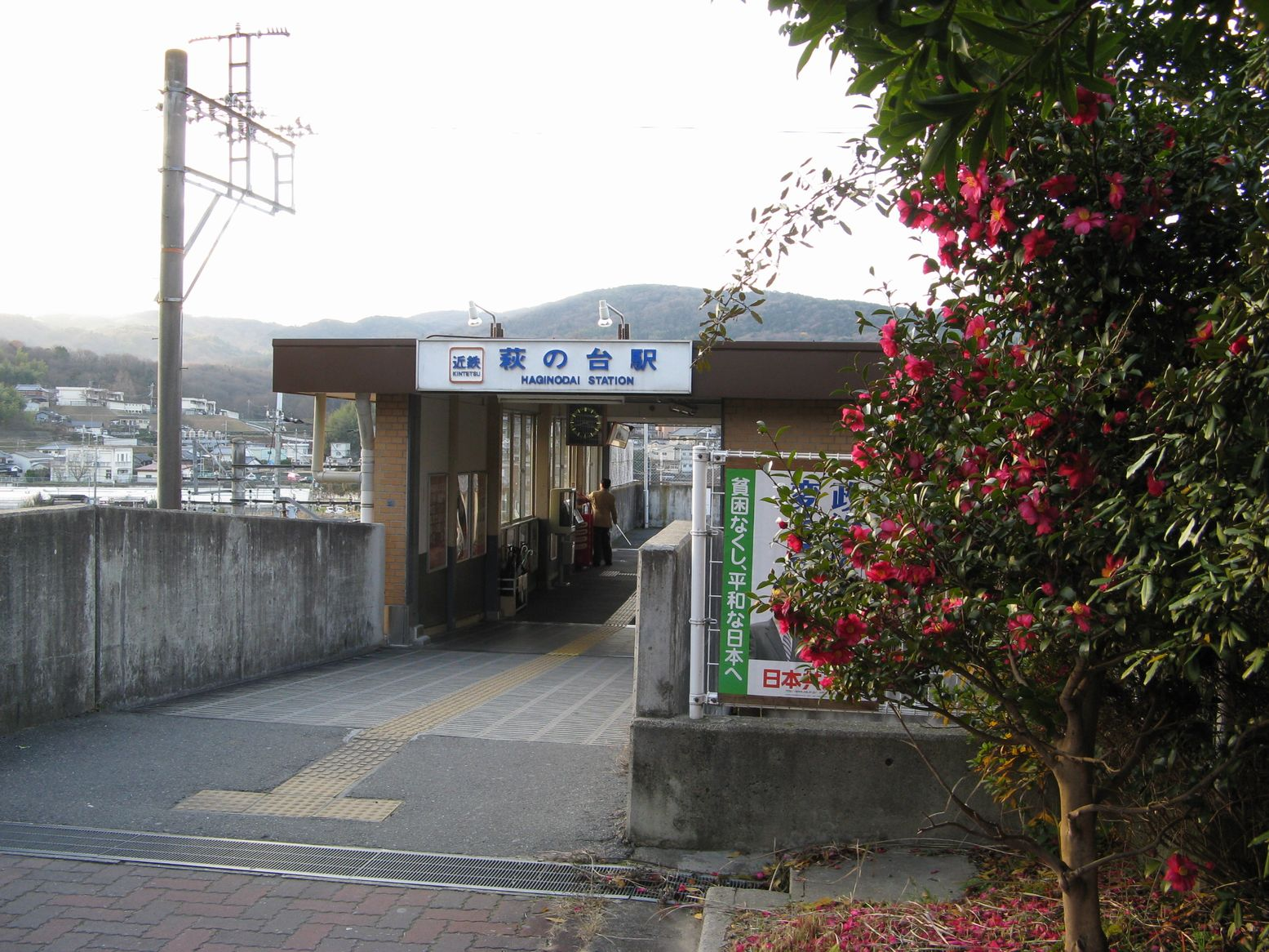 萩の台駅